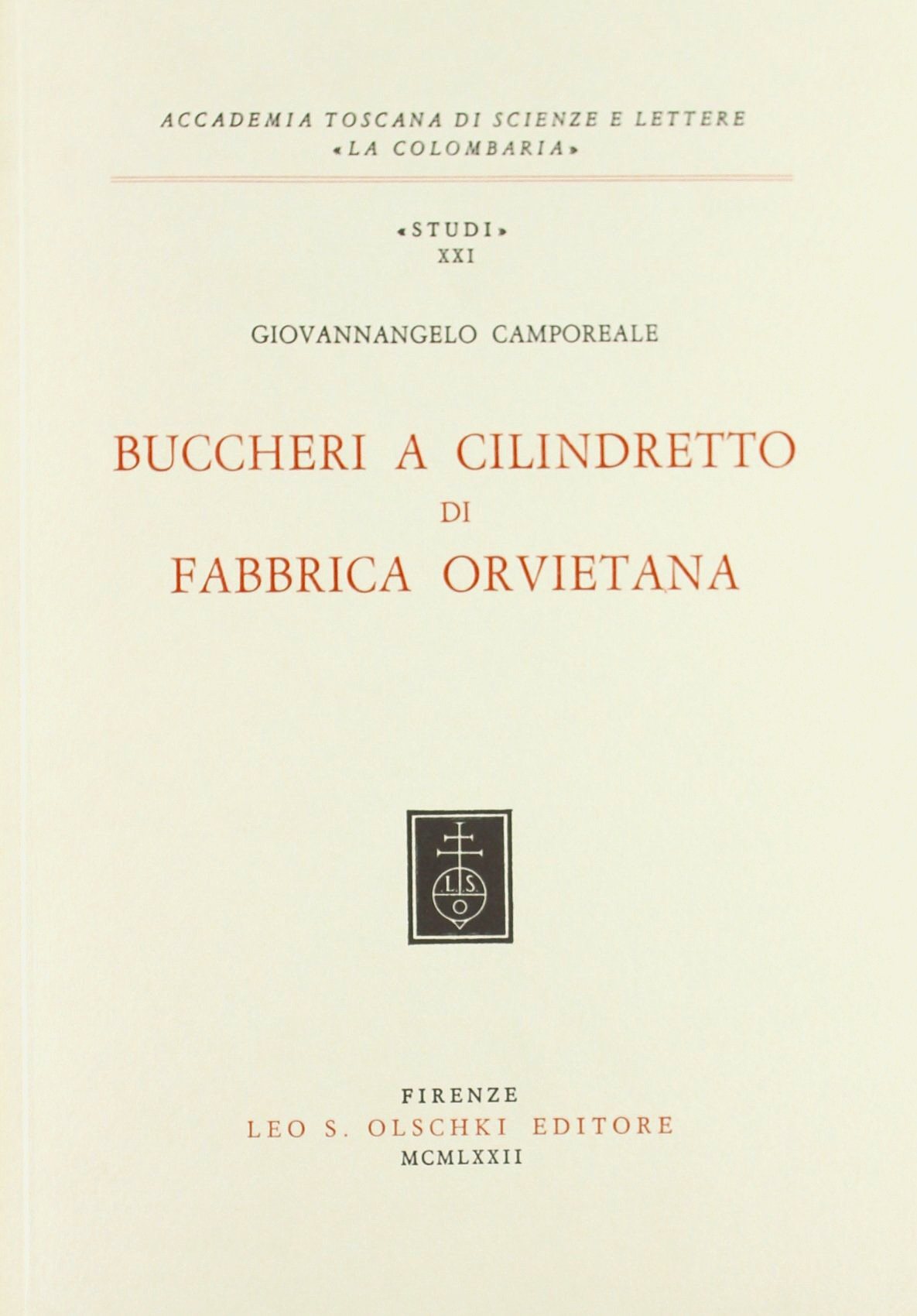 Giovannangelo Camporeale: Buccheri a cilindretto di fabbrica orvietana. Olschki, Firenze 2012, ISBN 9788822215475.